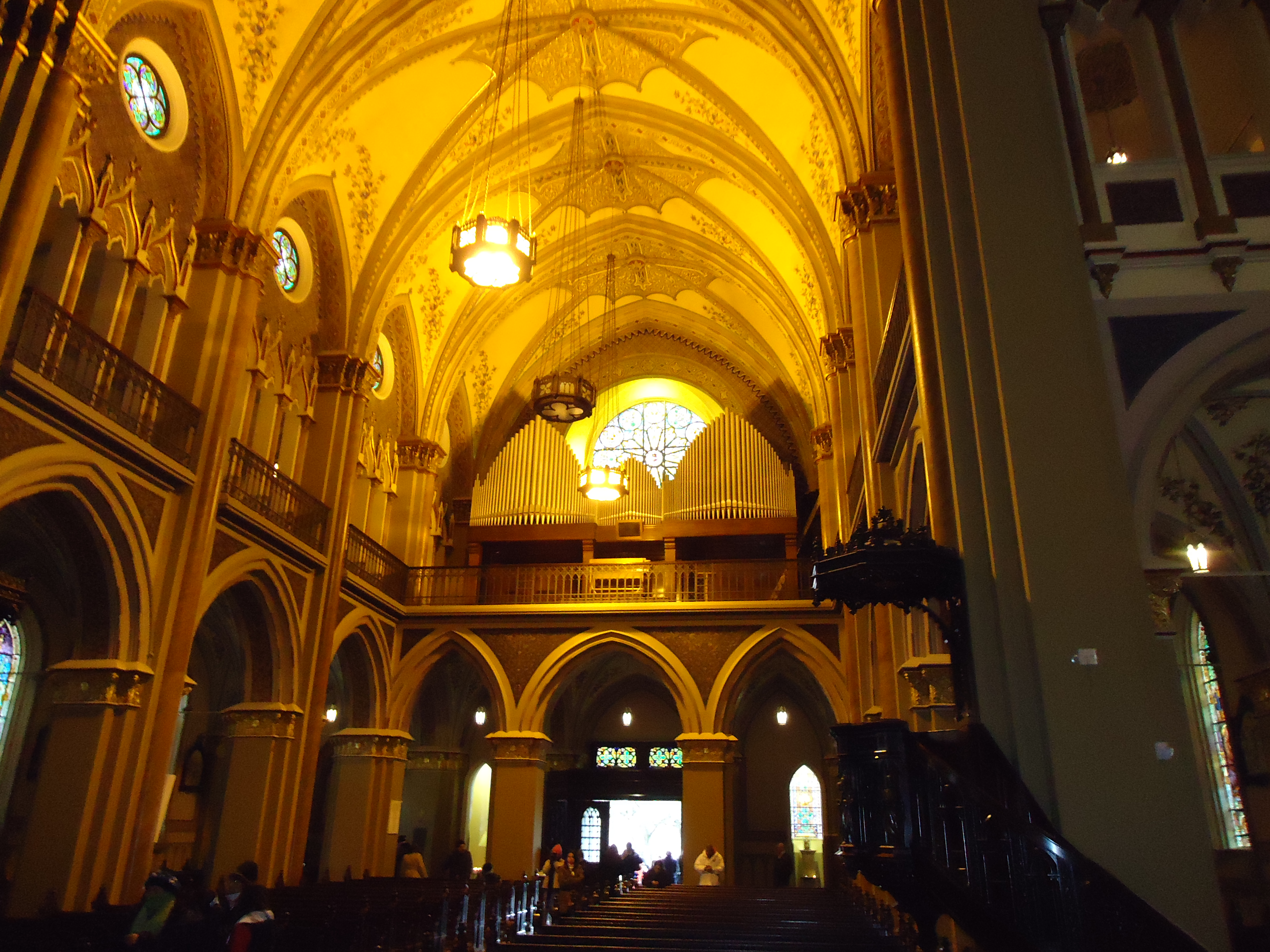 Interior da Catedral Metropolitana de Curitiba - julho de 2013